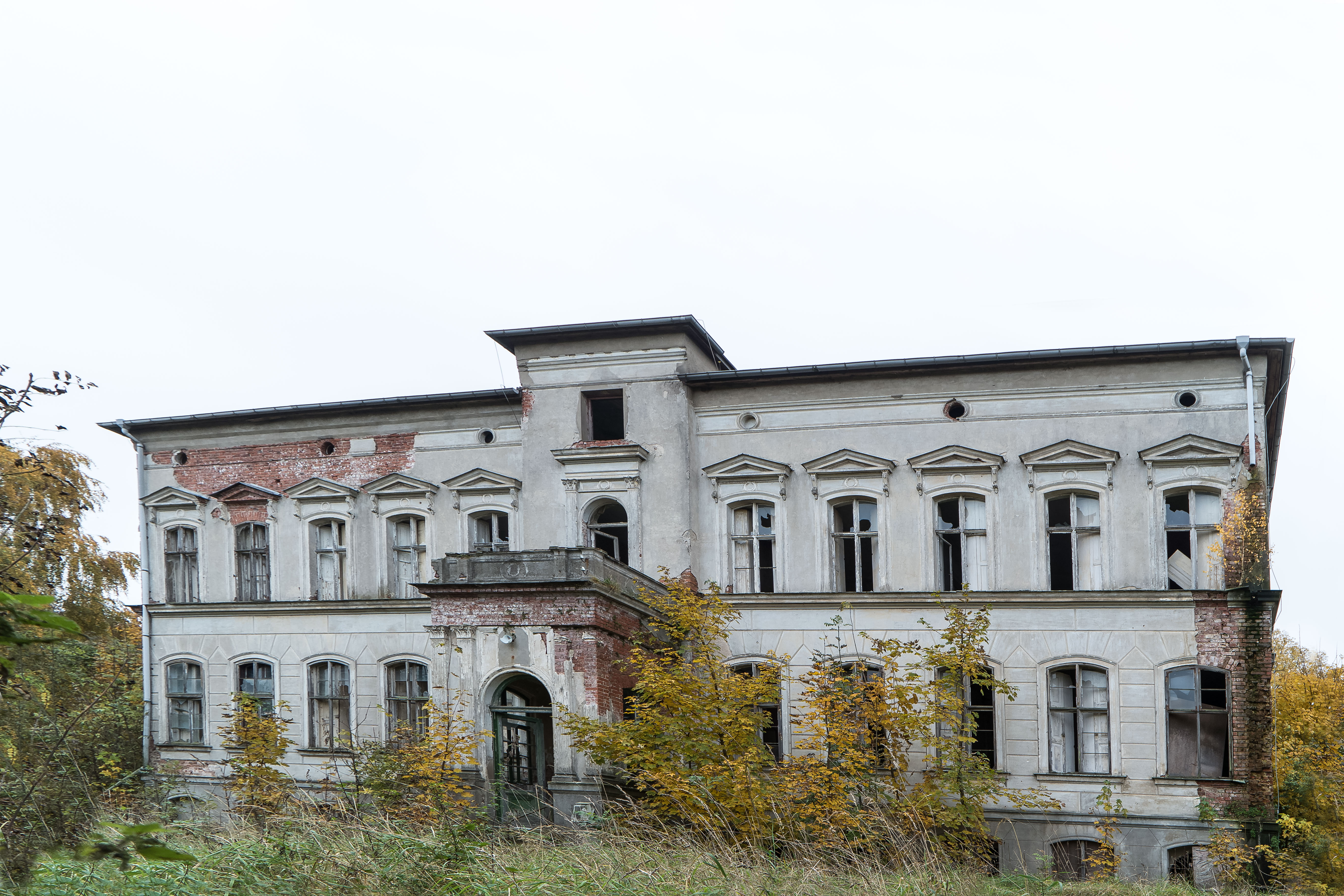 Gutshaus eines Rittergut, Dorfstraße 13 ff, in Hohenberg-Krusemark OT Osterholz